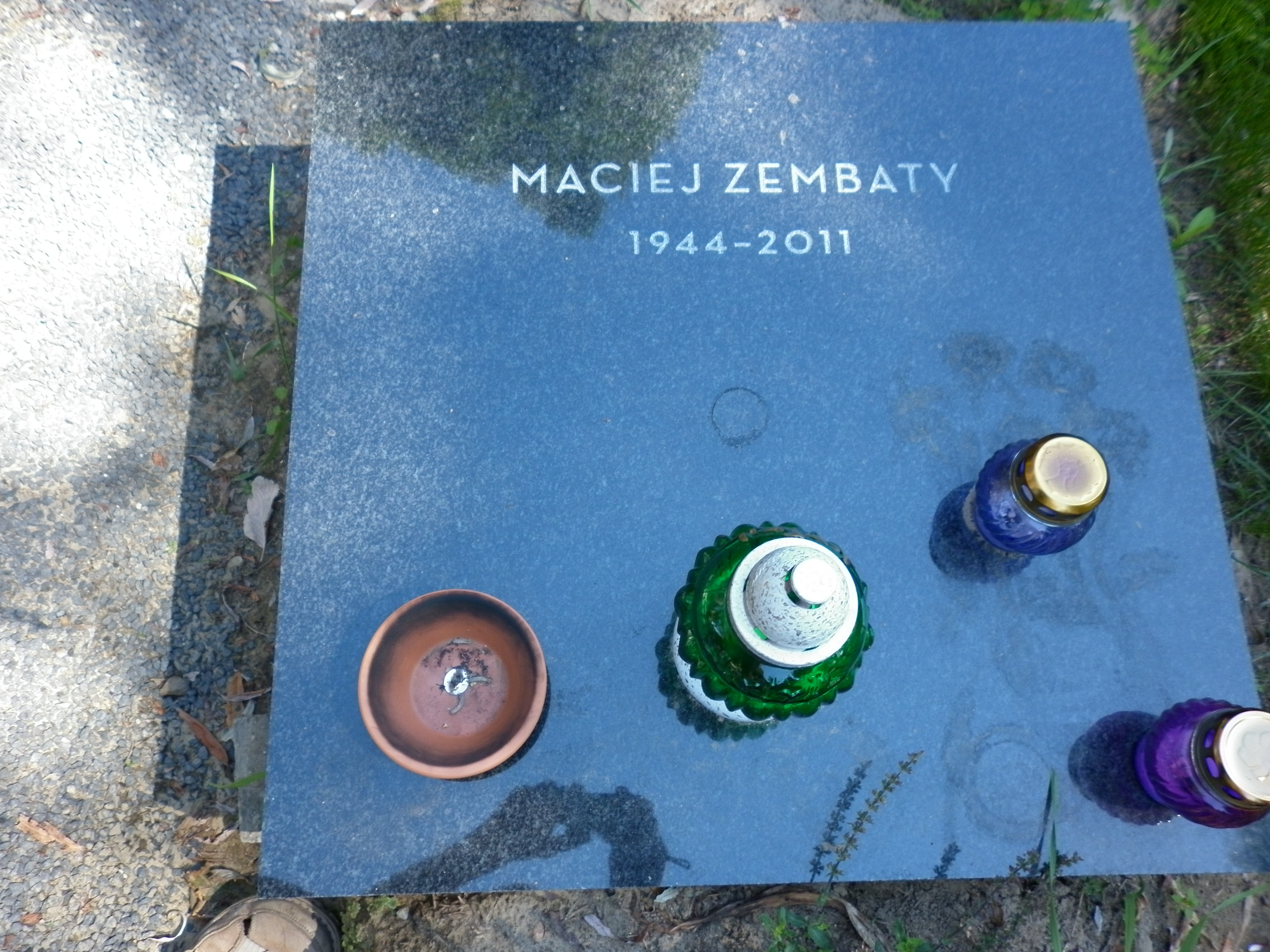 Grób Macieja Zembatego na Cmentarzu Wojskowym na Powązkach